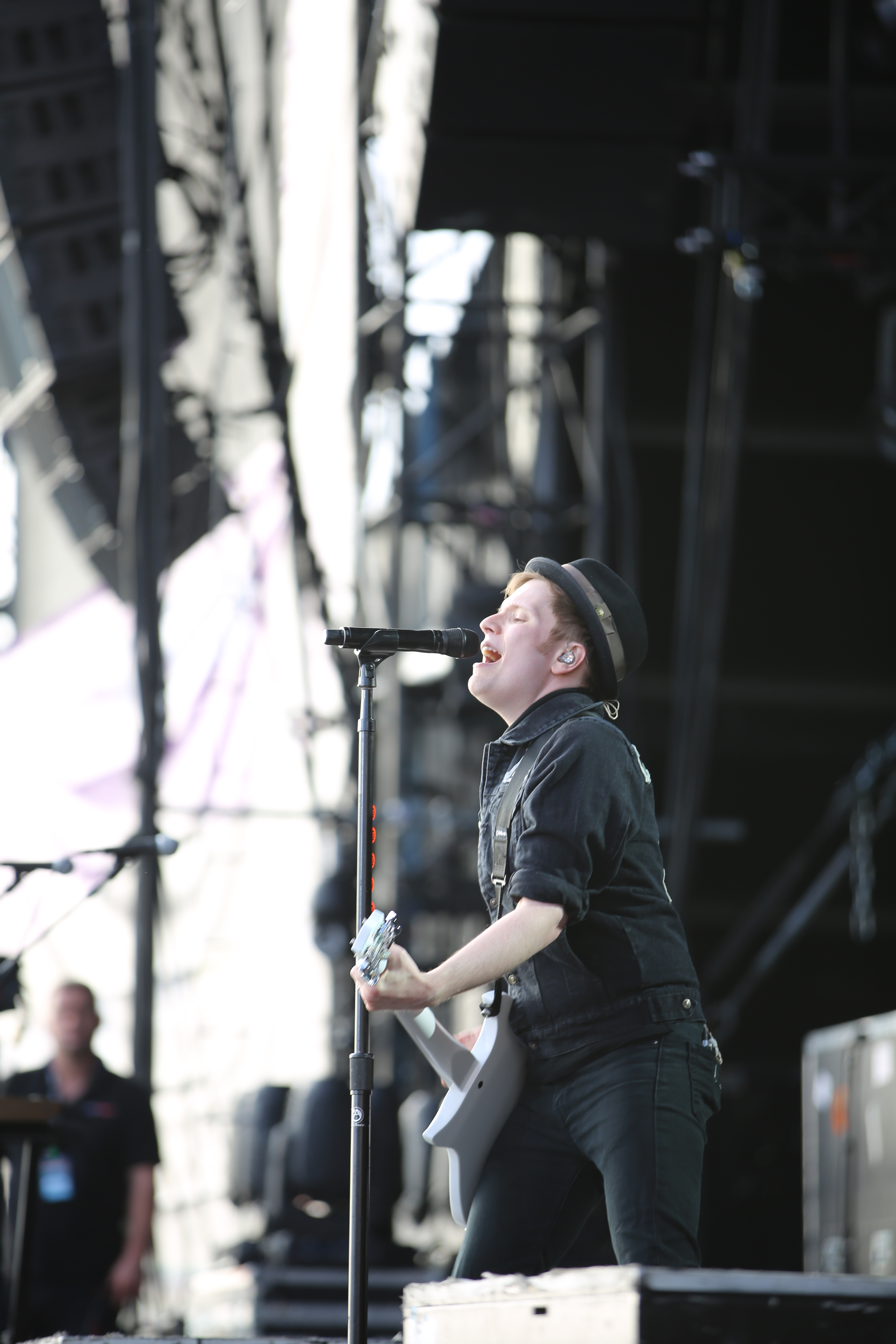 Fall Out Boy bei Rock am Ring 2014.